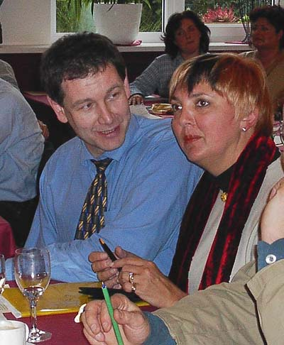 Der saarländische Grünen-Vorsitzende Hubert Ulrich in Gespräch mit Claudia Roth während einer Landesdelegiertenkonferenz in Neunkirchen (Saar)